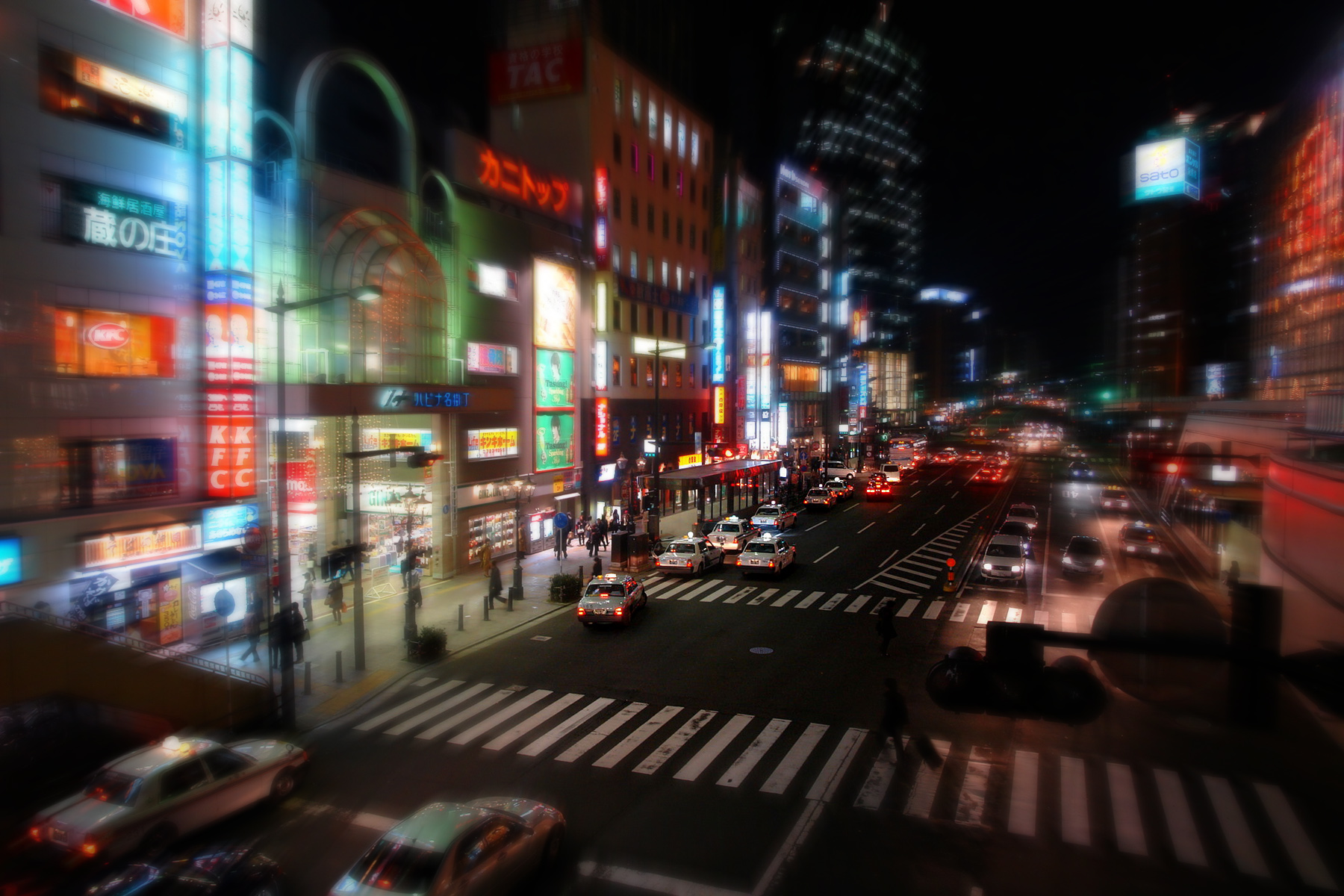 駅前通り.